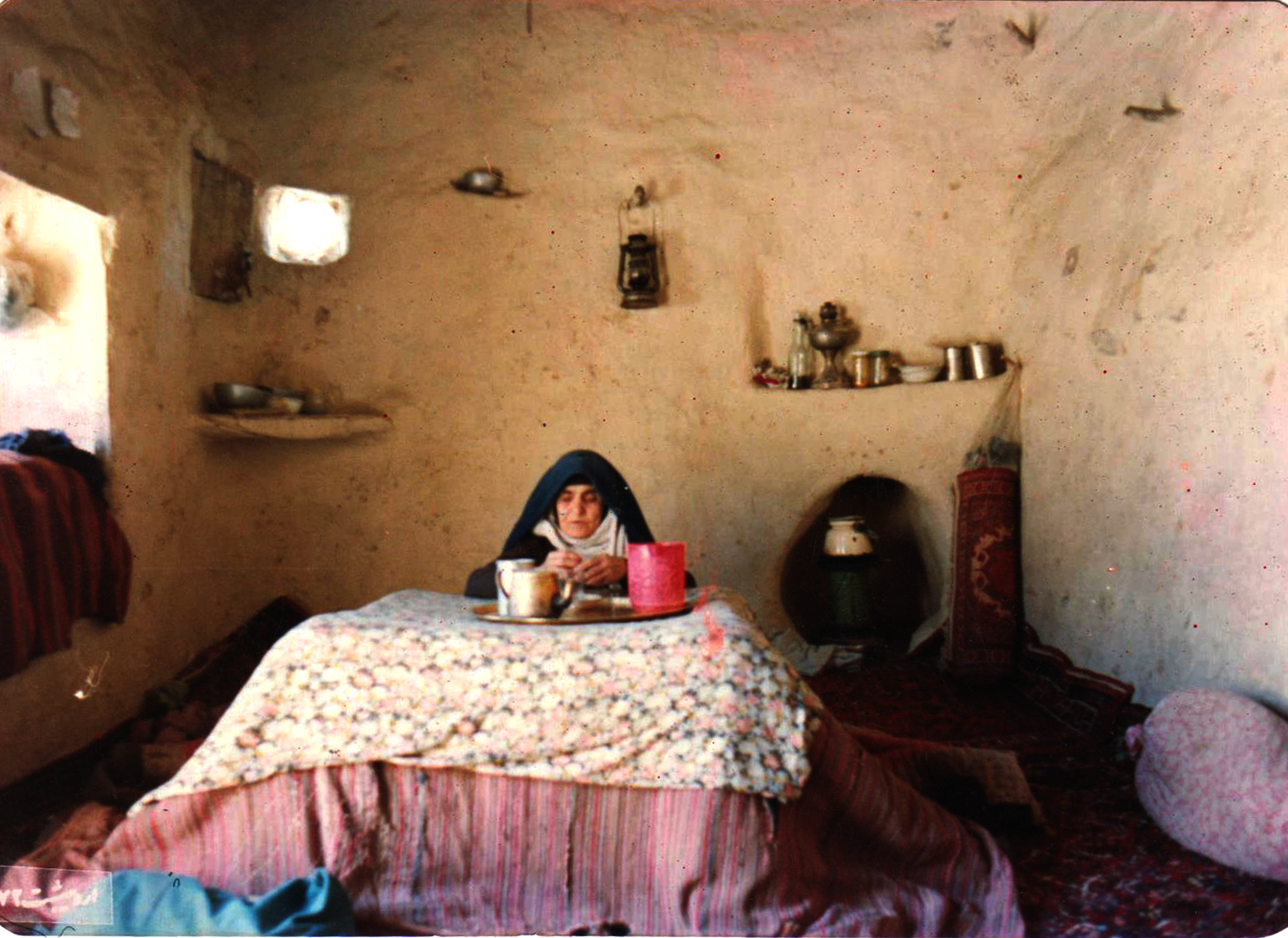 خانه مادربزرگ- خاطرات -ایران- تفرش